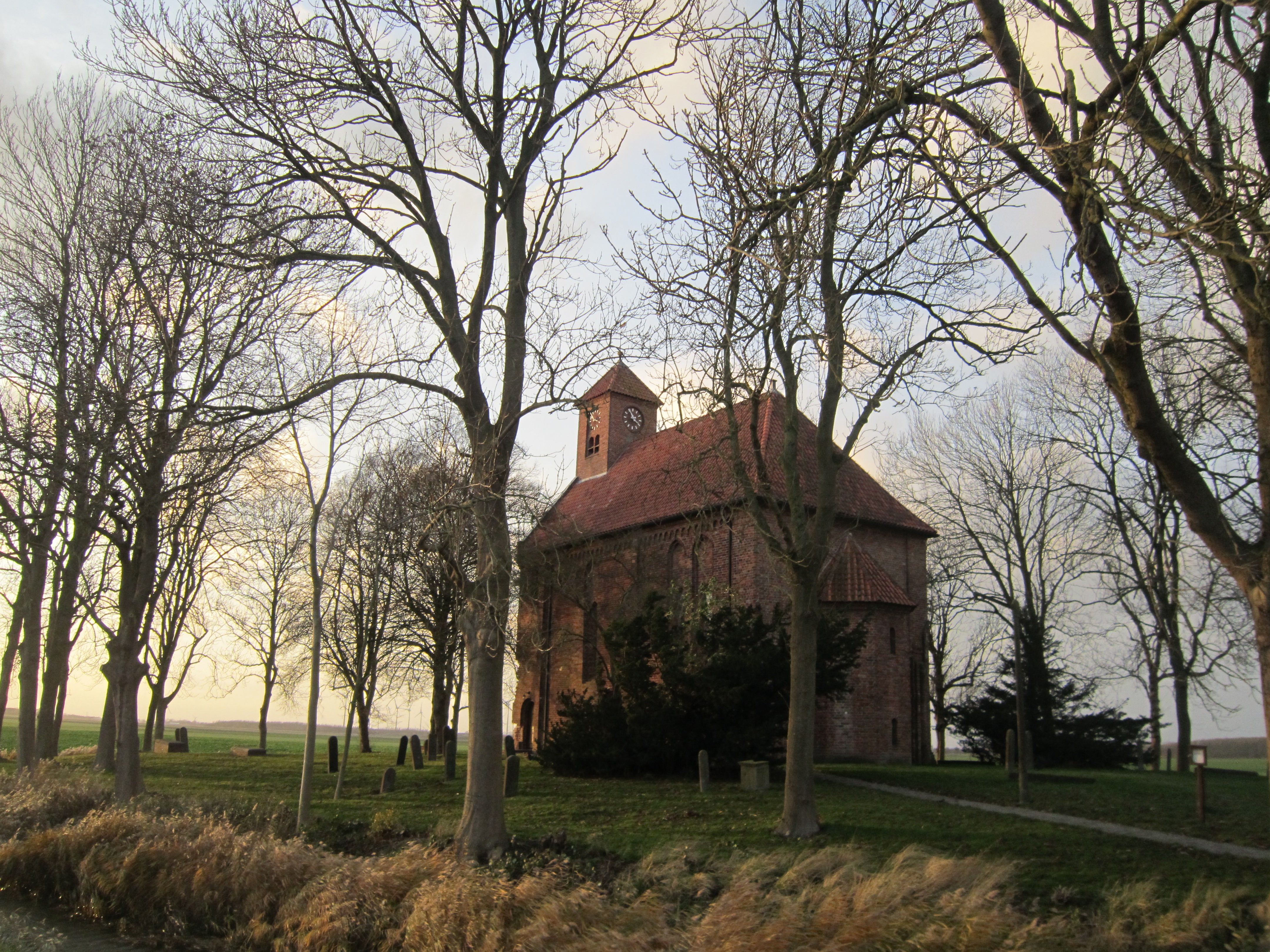 Petruskerk Woldendorp